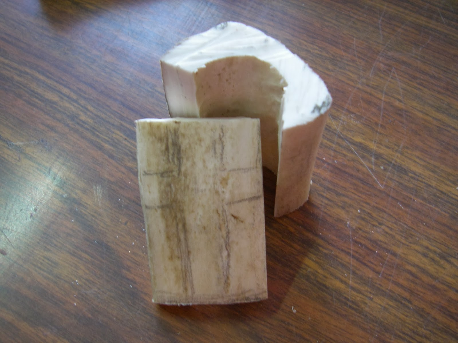 Hueso de ternera que se usa como materia prima para hacer diversos objetos artesanos como por ejemplo una cruz, pendientes, mango de un portapluma, etc.